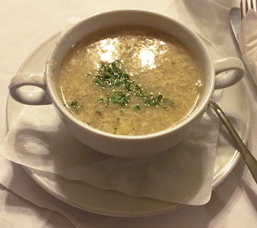 Griessuppe mit Ei